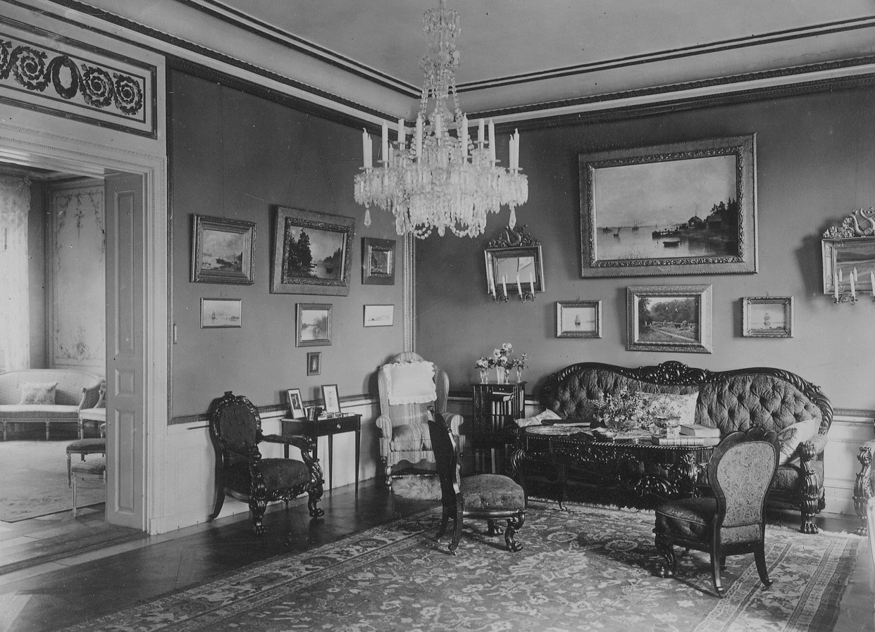 En av Sturhovs salar under Reuterskiöld